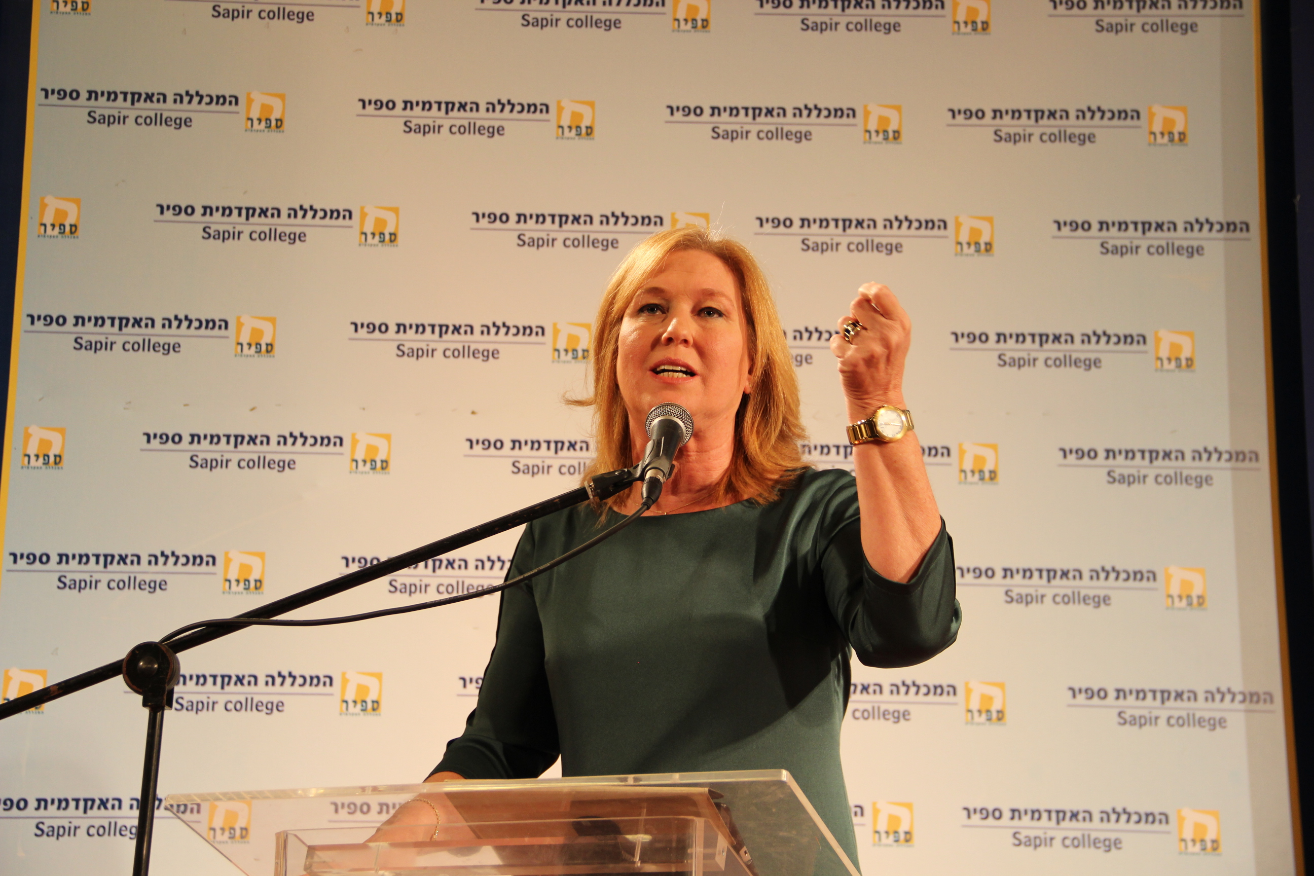 כנס שדרות לחברה במכללה האקדמית ספיר ובעיר שדרות 2015